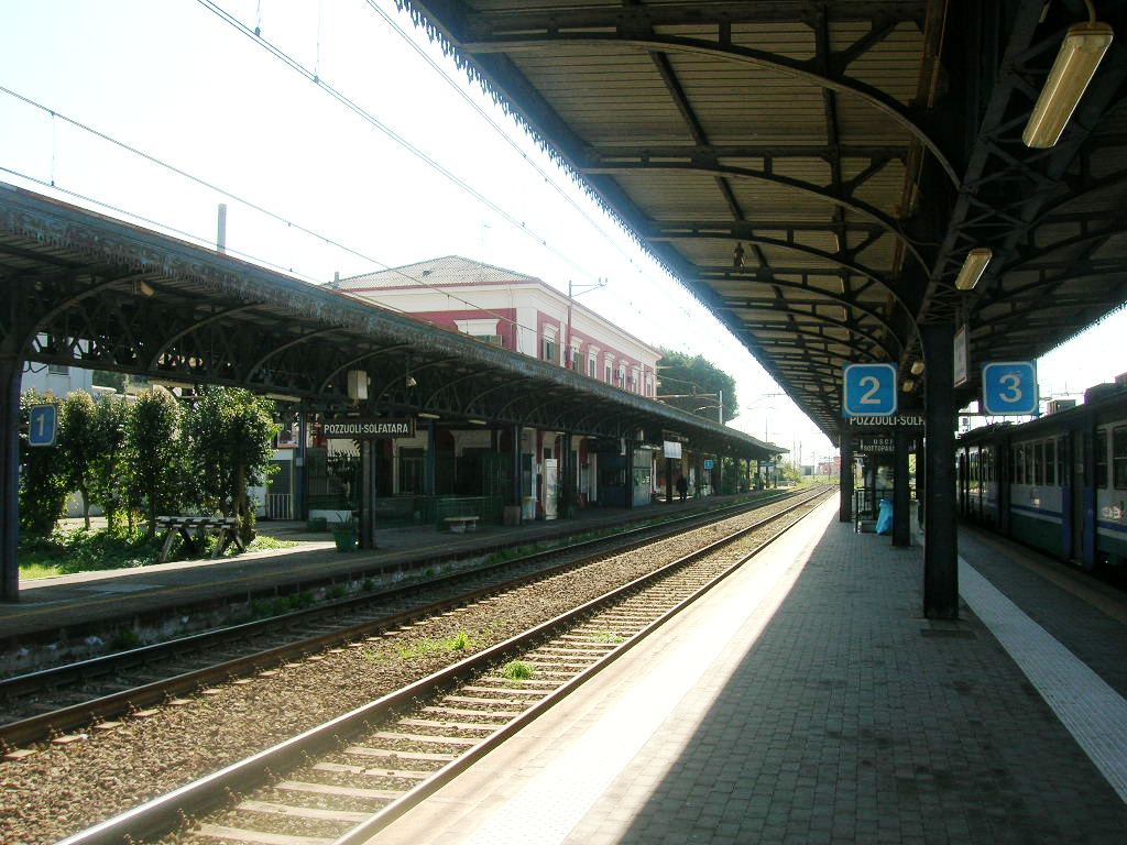 L'interno della stazione di Pozzuoli Solfatara